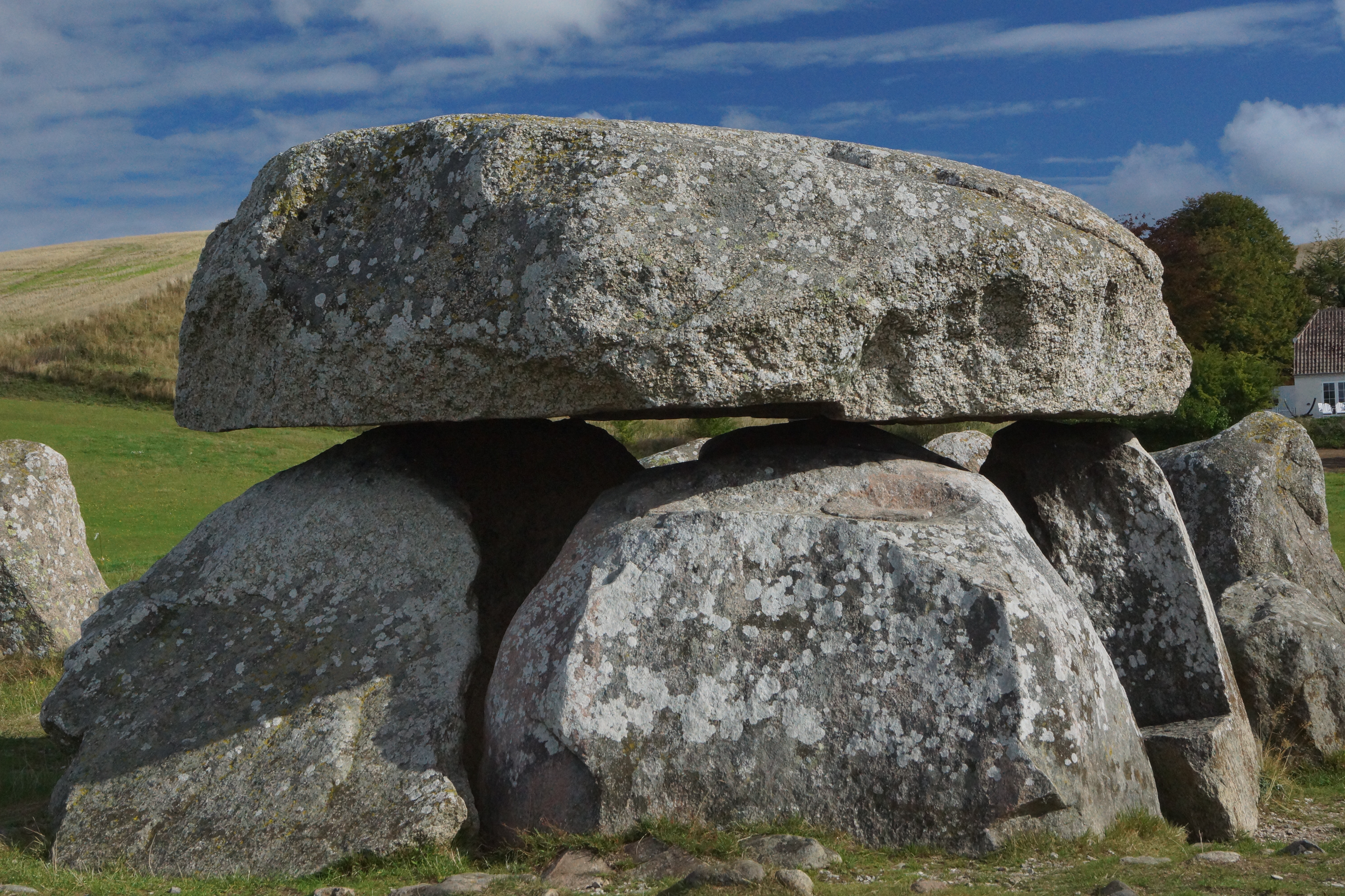 Poskær Stenhus (2)